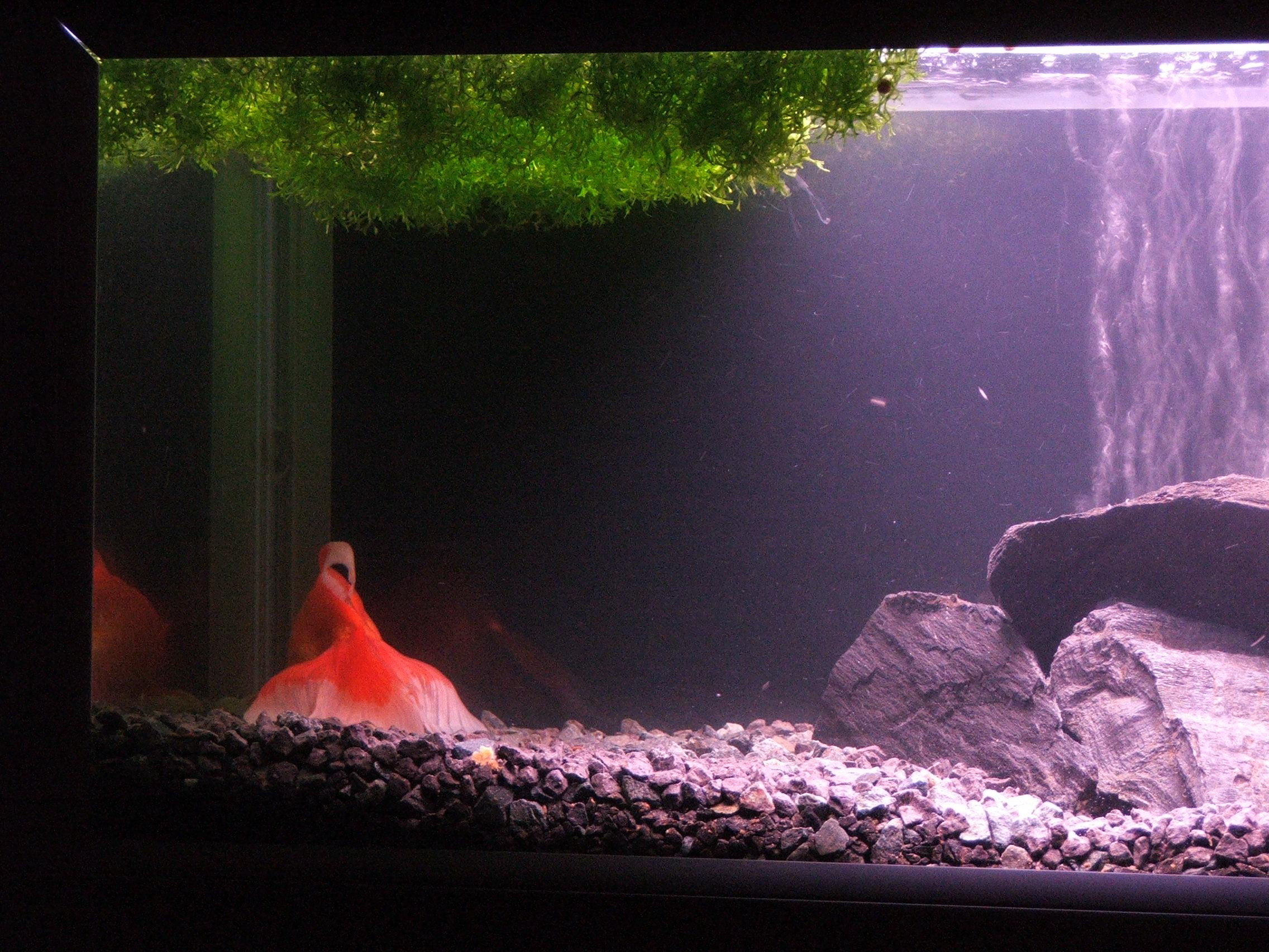 Riccia fluitans